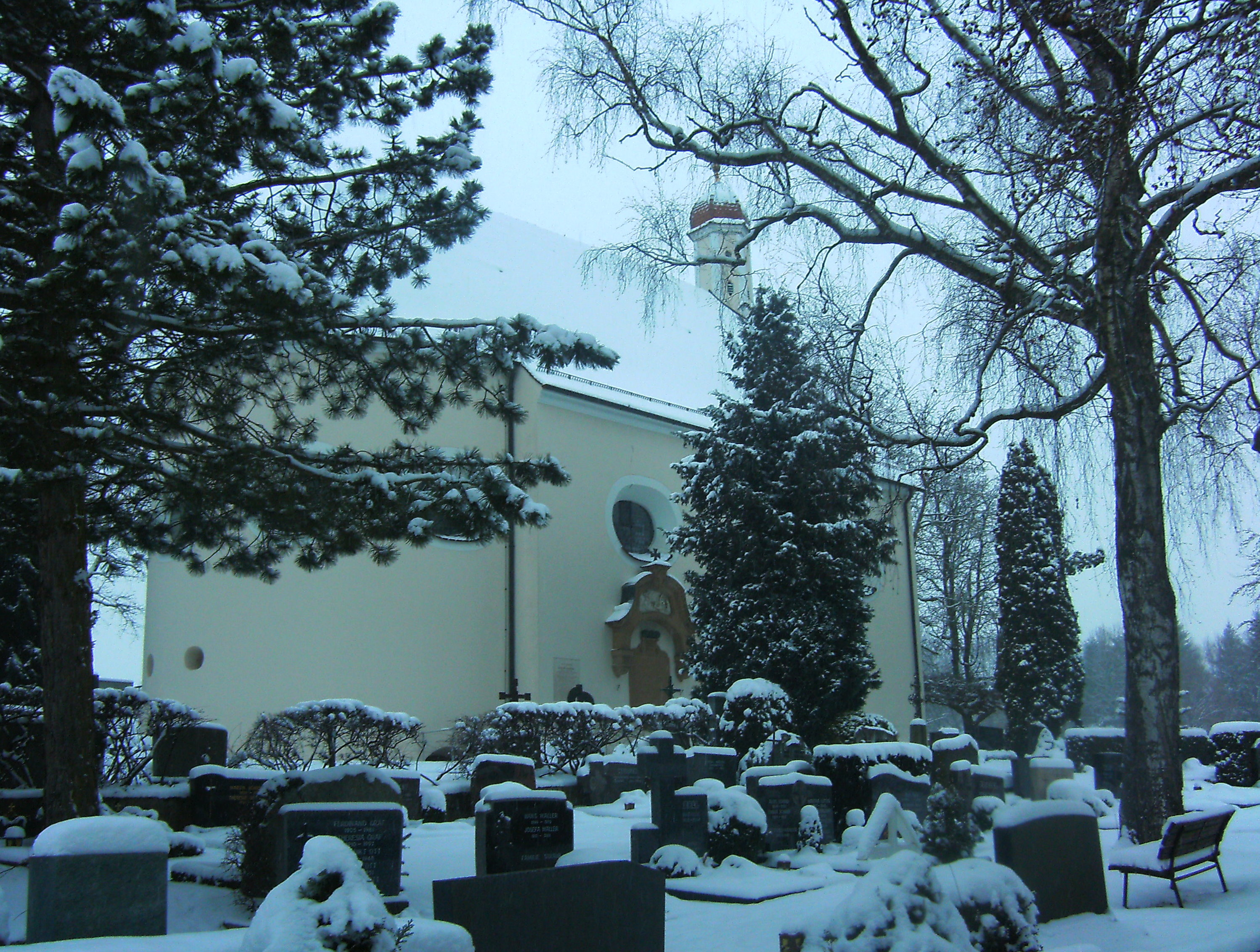 Grabkapelle St. Veit in Ochsenhausen - Ansicht von Osten